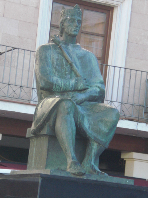 Skulptajxo de Alfonso la 10-a en Ciudad Real